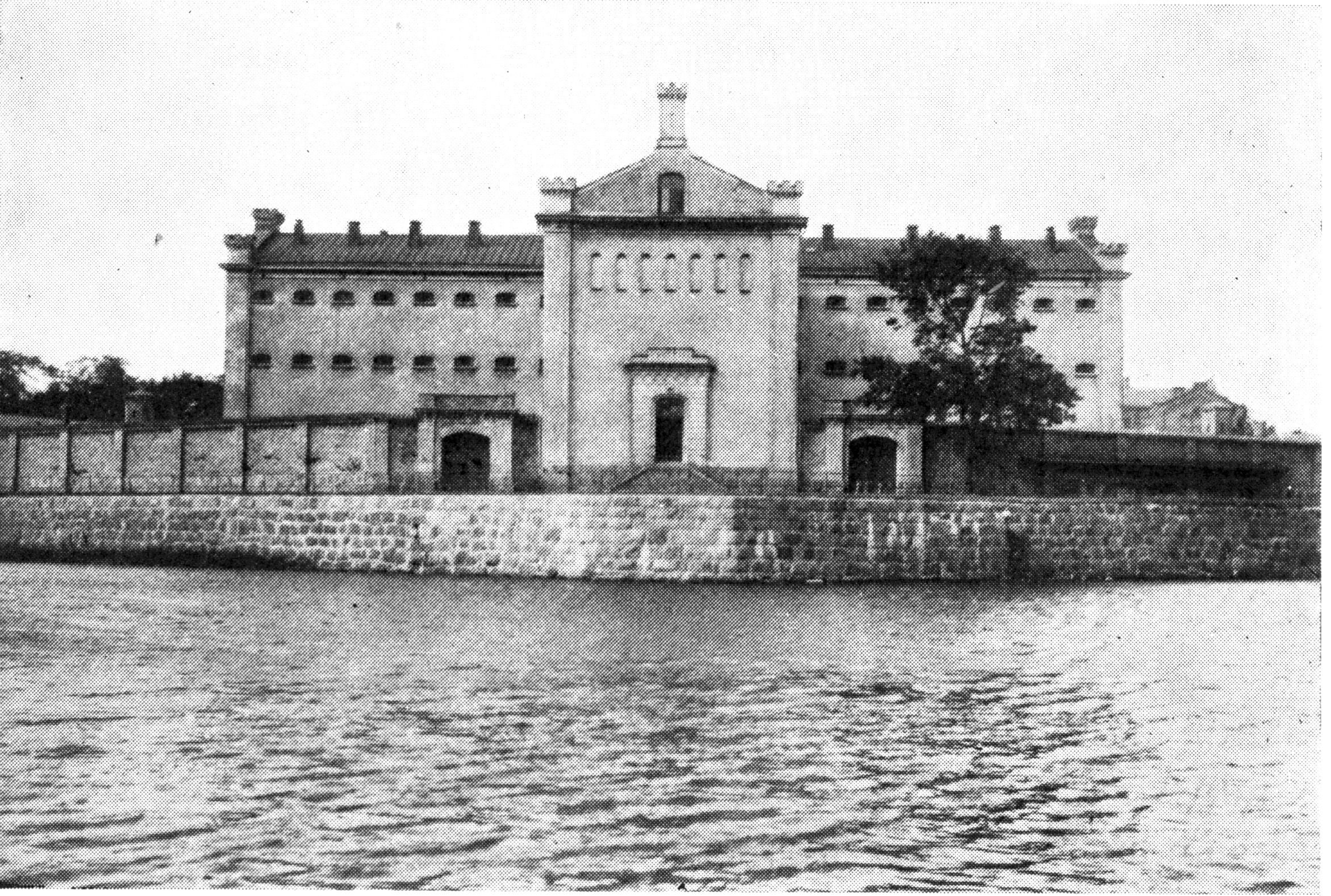 Länsfängelset i Kalmar